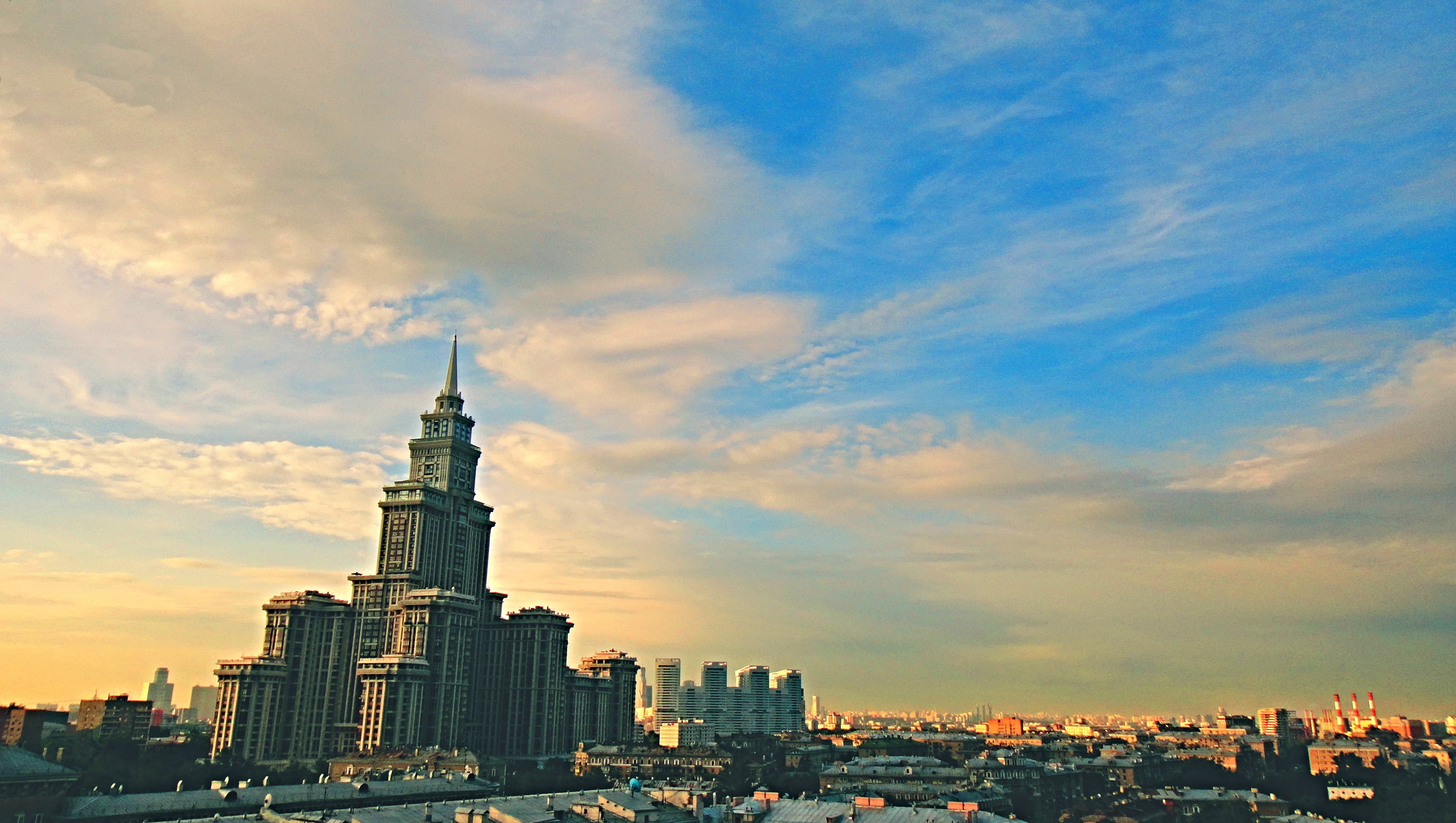 фото сделано первыми холодными осенними днями 2012 год